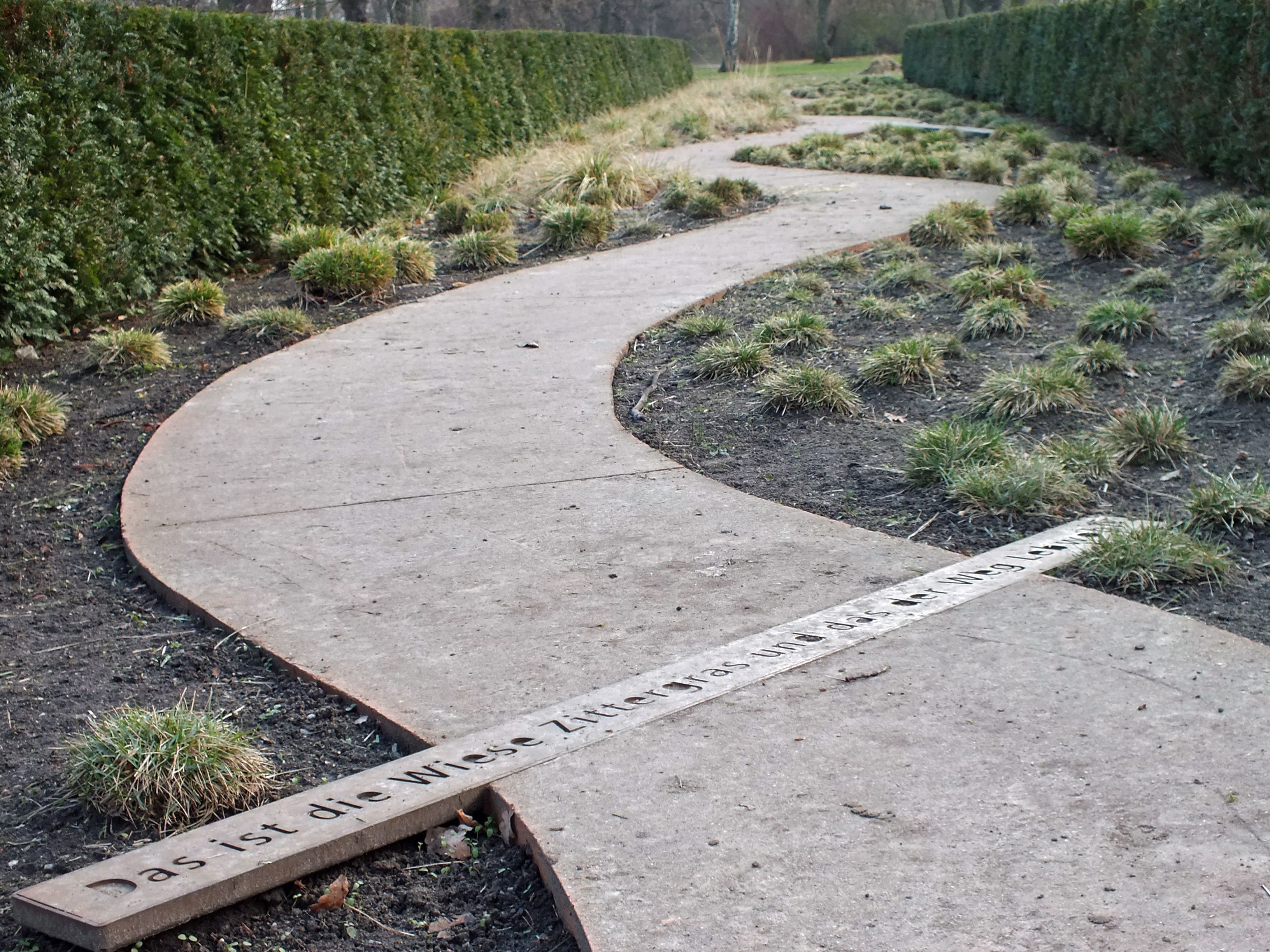 Gedenkstätte für die Opfer der Kindereuthanasie in Leipzig im Friedenspark mit dem Text aus einem Gedicht der österreichischen Dichterin Christine Lavant (1915–1973): Das ist die Wiese Zittergras und das der Weg Lebwohl.